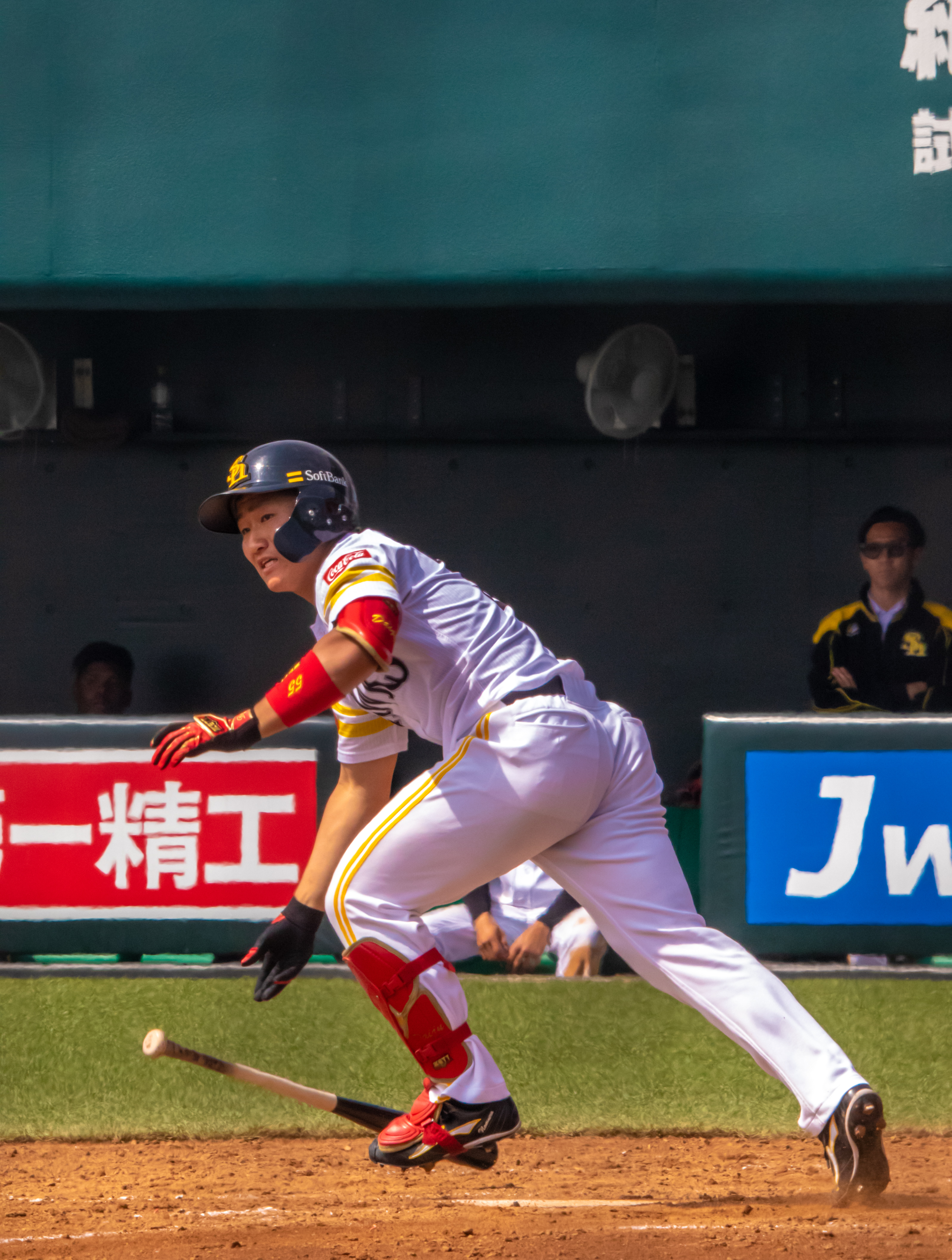 2019/4/16 タマホームスタジアム筑後